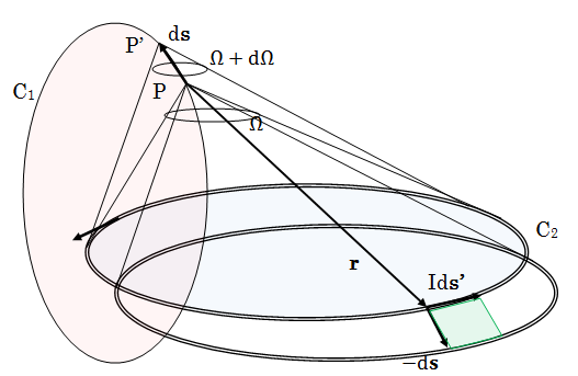 ビオ・サバールの法則。閉曲線上の点から環状電流を俯瞰する立体角をΩとする